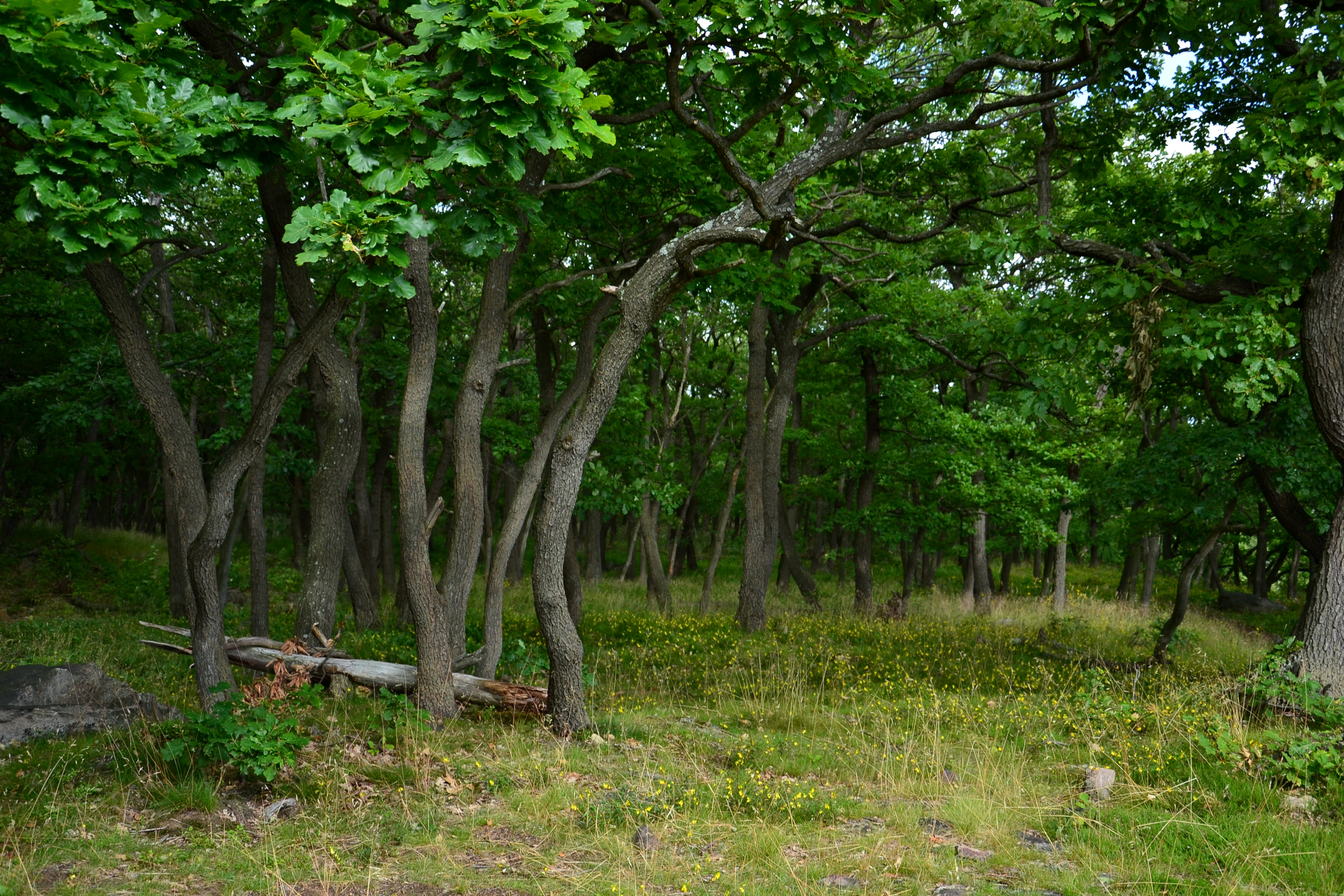 Hradiště u Černovic – okraj dubového lesa na jižní straně vrchu